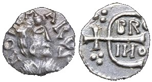 Denier d'Ebroïn au nom du monétaire Rodemarus, frappé à Paris. BNF, monnaies, médailles et antiques. Avers : Buste à droite. Revers : Monogramme d'Ebroïn.